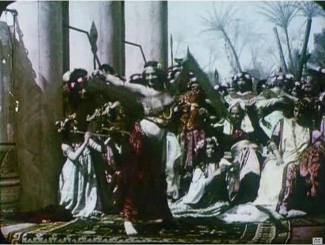 Dance of the seven veils